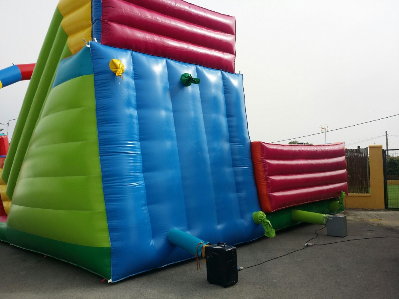 La función de la turbina de aire es hinchar y mantener hinchado el castillo hinchable